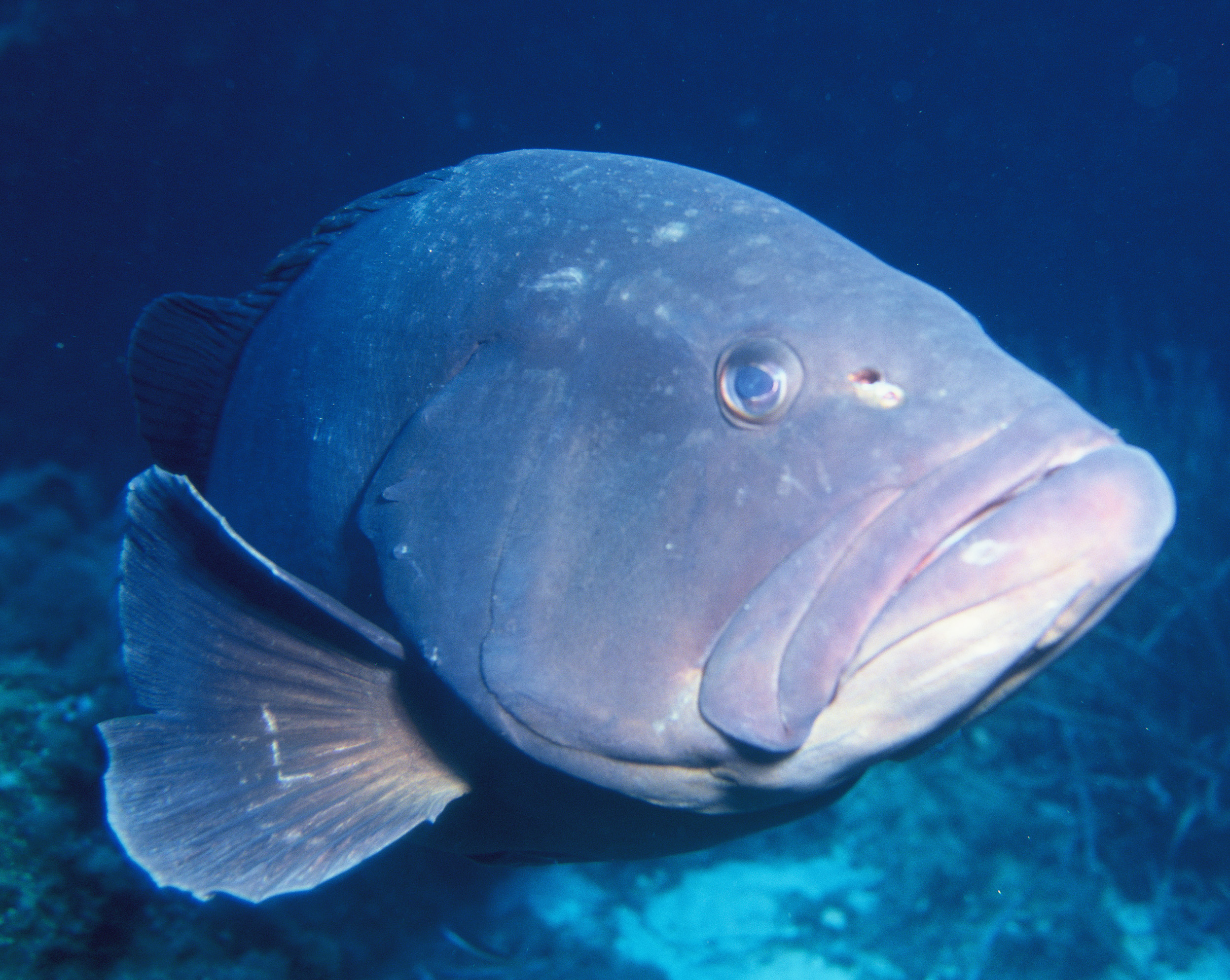 epinephelus marginatus (Gabiniere)